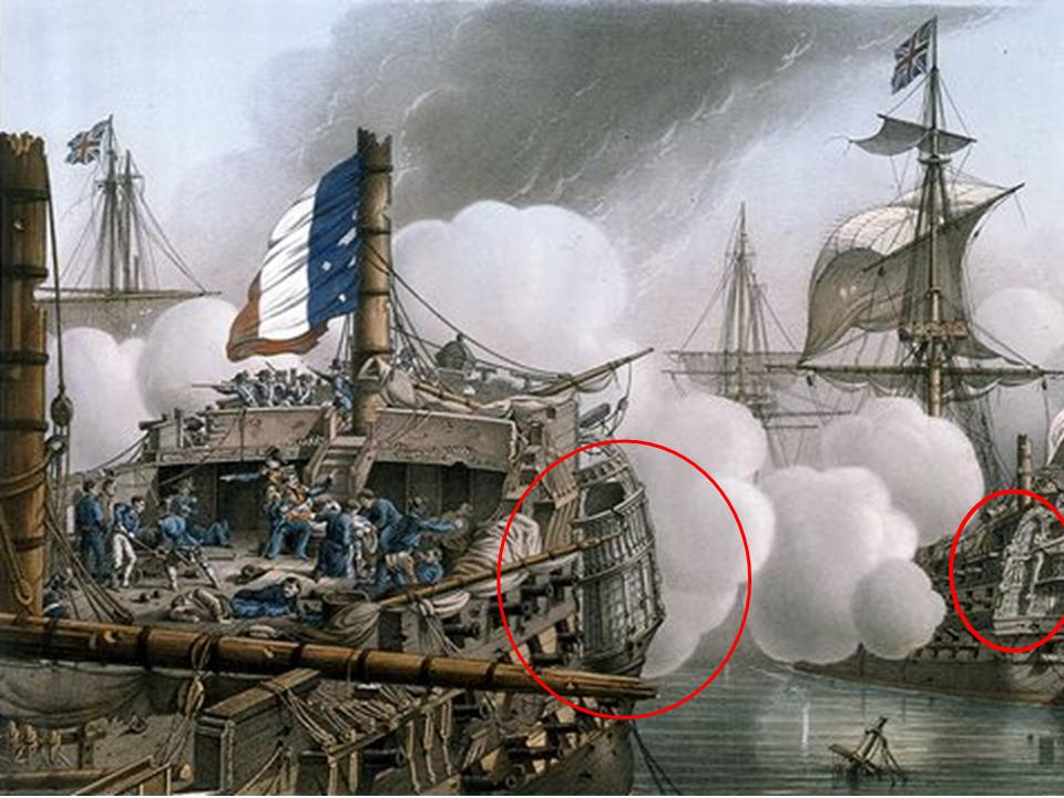 Seitentaschen an Segelkriegsschiffen